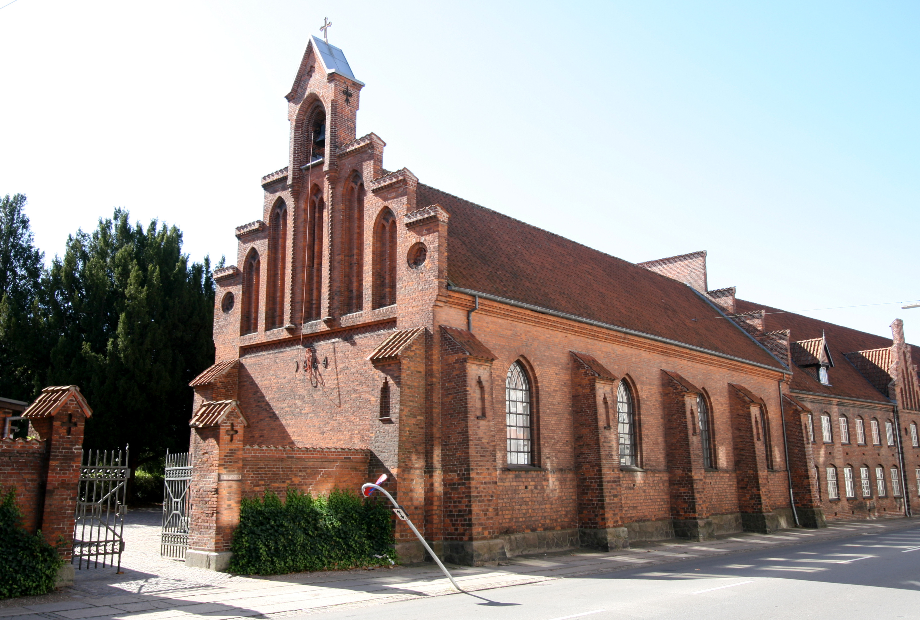 Helligåndskirken, Slagelse, Denmark